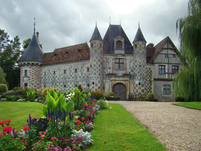 Château de Saint-Germain-de-Livet, Calvados, Normandie, France.